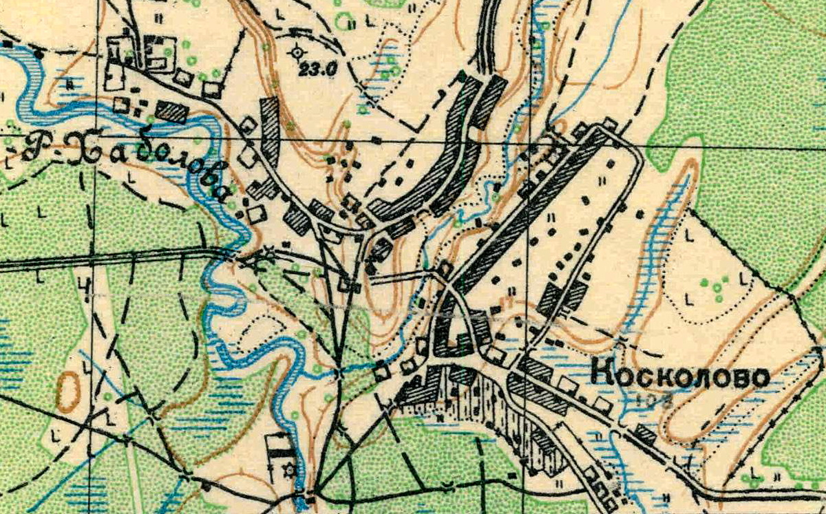 Топографическая карта Ленинградской области, квадрат О-35-9-Г-г (Косколово), деревня Косколово